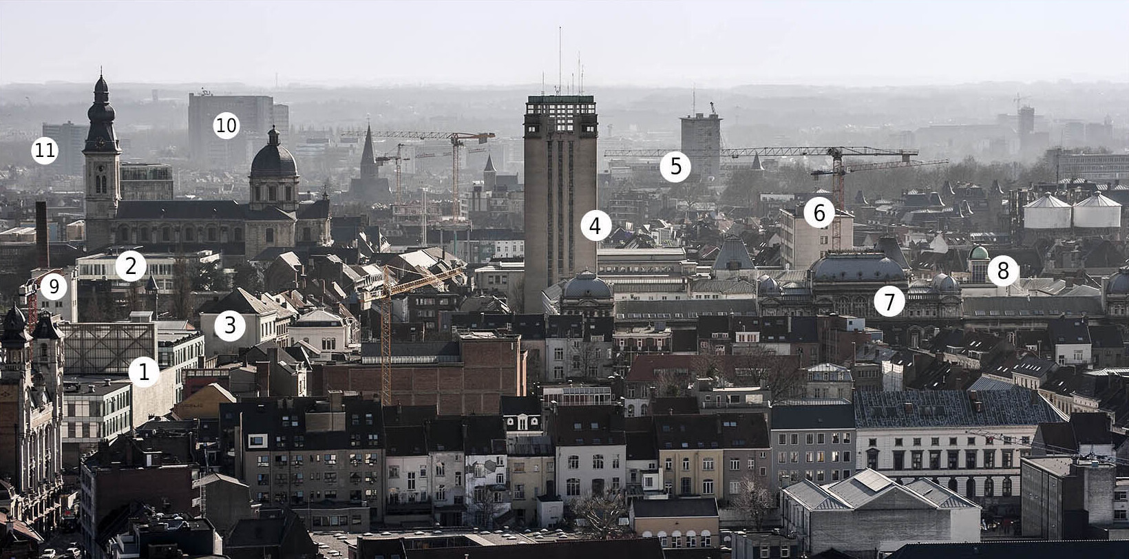 Panorama van de stad Gent met enkele gebouwen van de Universiteit Gent (UGent): 1 Ufo – universiteitsforum / 2 Economie & bedrijfskunde / 3 Studentenrestaurant De Brug / 4 Boekentoren – universiteitsbibliotheek / 5 Ledeganck – wetenschappen en plantentuin / 6 Blandijn – letteren & wijsbegeerte / 7 Plateau & Rozier – ingenieurswetenschappen & architectuur, letteren en wijsbegeerte / 8 Volkssterrenwacht Armand Pien / 9 Therminal – studentenhuis / 10 UZ – geneeskunde & gezondheidswetenschappen / 11 Home Boudewijn /